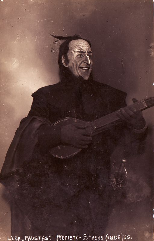 Stasys Audėjus (1888 m. gruodžio 29 d. Vilniuje – 1958 m. spalio 15 d. ten pat) – lietuvių dainininkas (bosas). Fotografijoje - Mefisto vaidmuo Šarlio Guno operoje "Faustas".